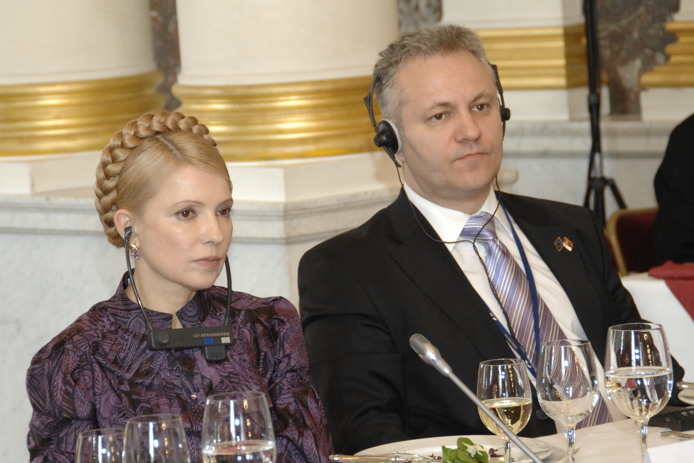 EPP Summit 19 March 2009